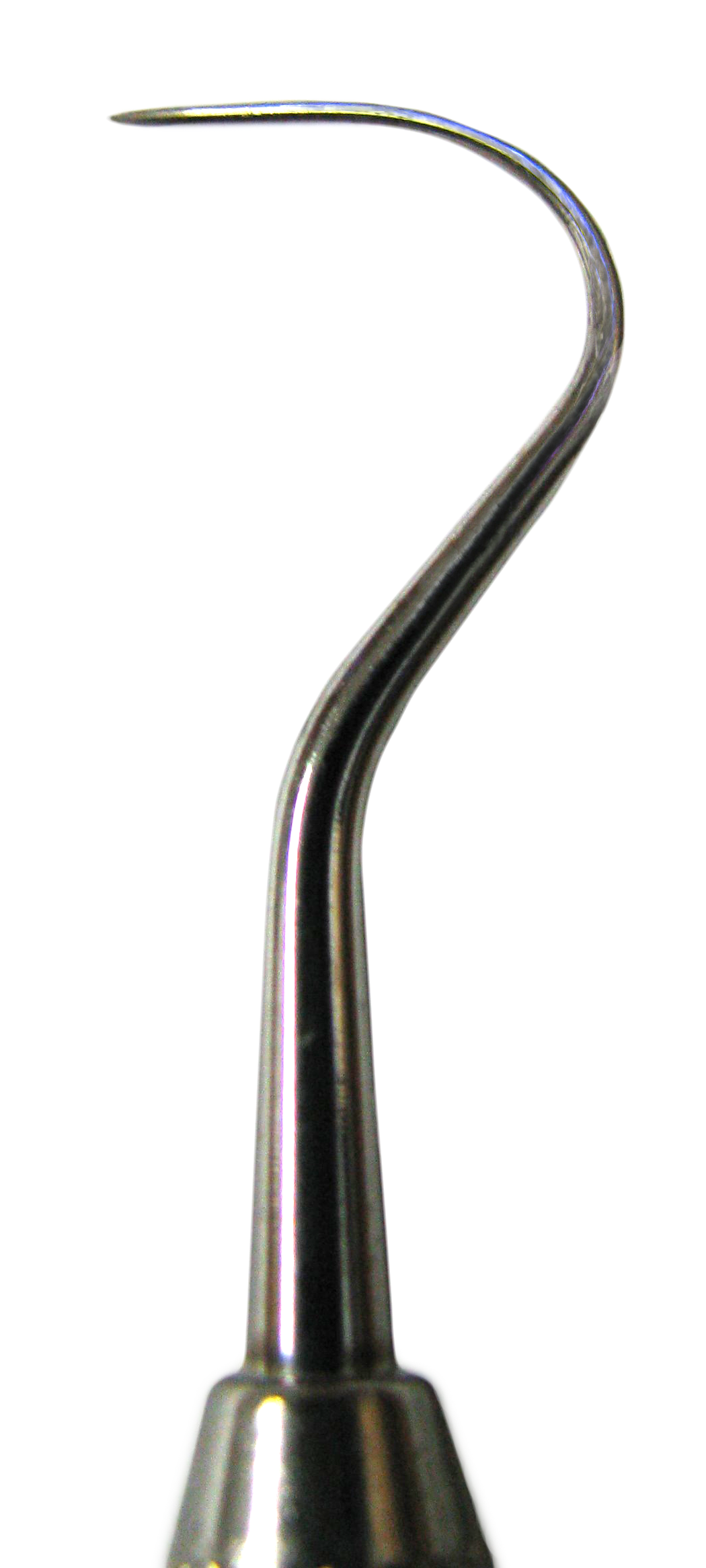 dental explorer